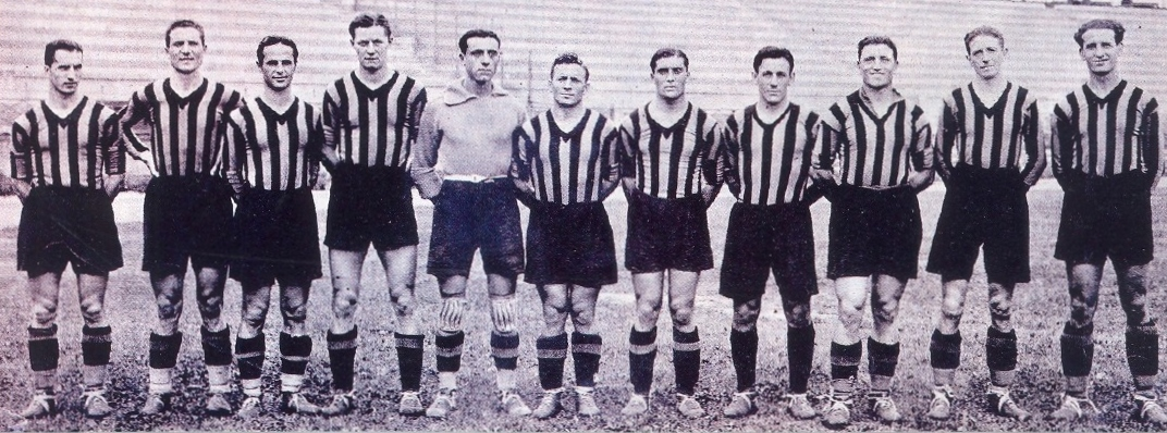 Una formazione dell'Ambrosiana-Inter nella stagione 1933-34. Da sinistra: (?), P. Agosteo, A. Pitto, G. Viani, C. Ceresoli, P. Serantoni, G. Meazza, A. Demaría, V. F. Levratto, A. Castellazzi, L. Allemandi.